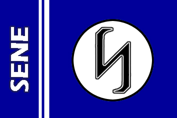 Nova Bandeira Oficial da SENE